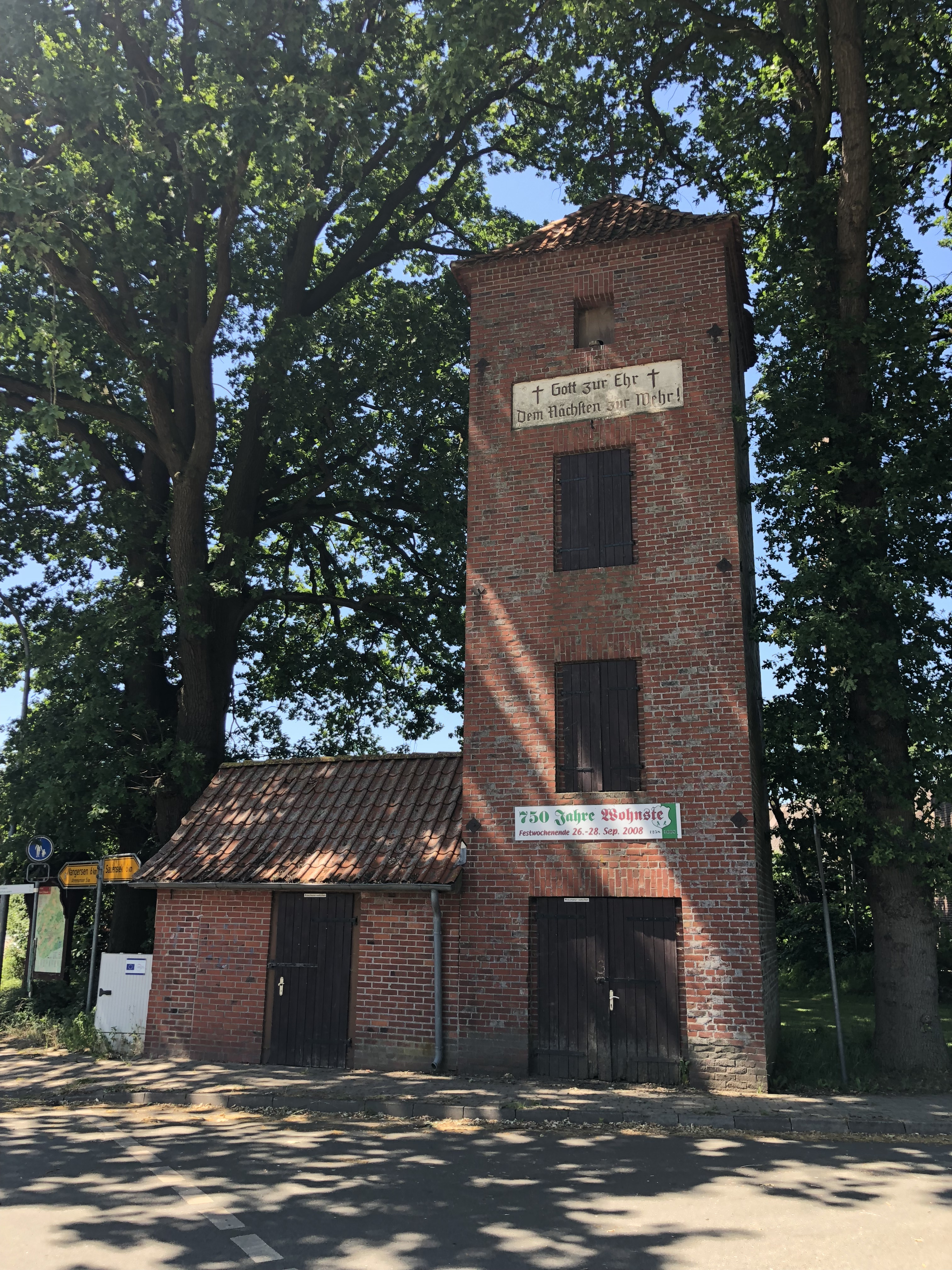 Slauchtoorn in Groot Woonst